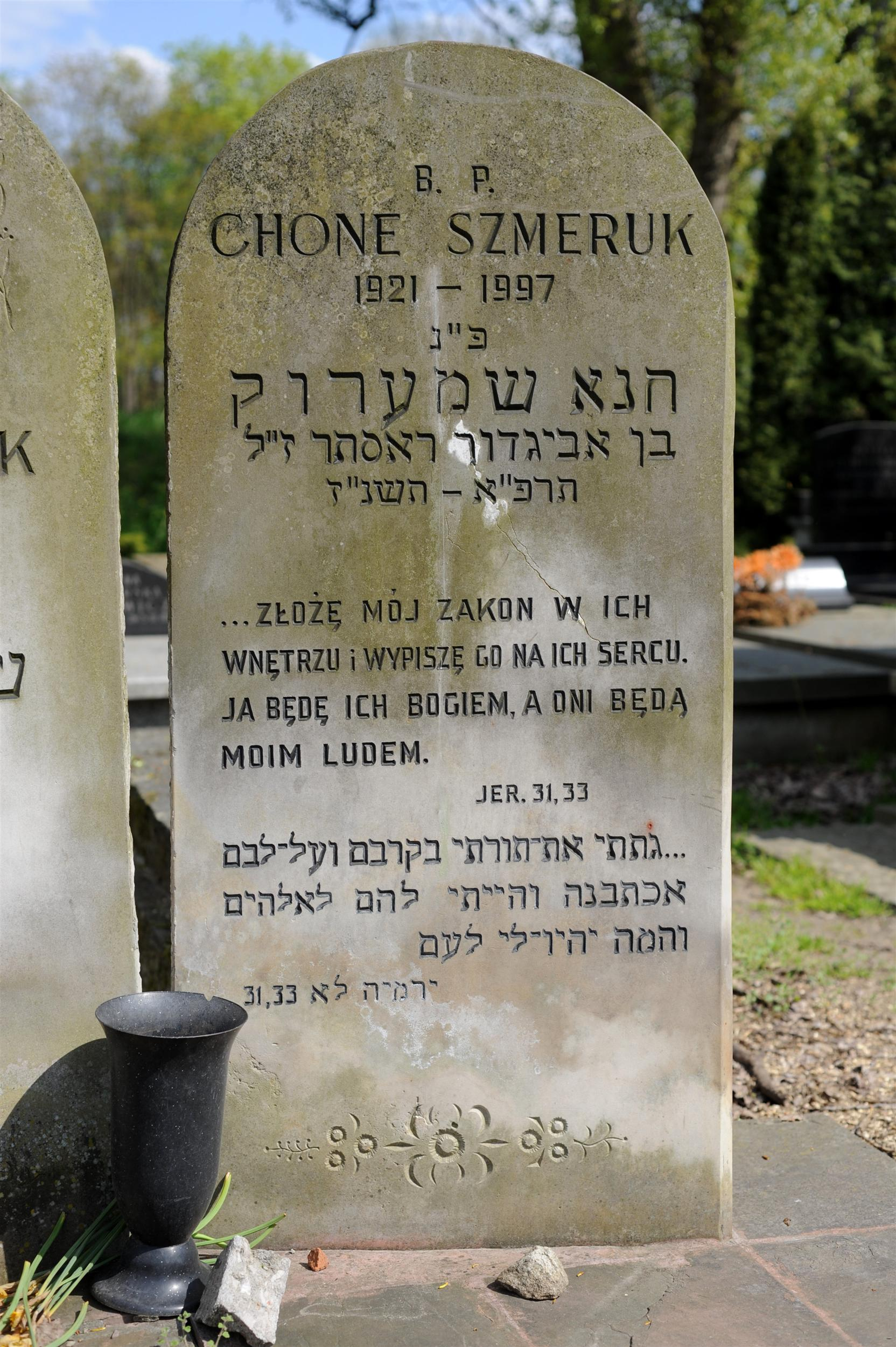 Grób Chone Szmeruka na Cmentarzu Żydowskim w Warszawie